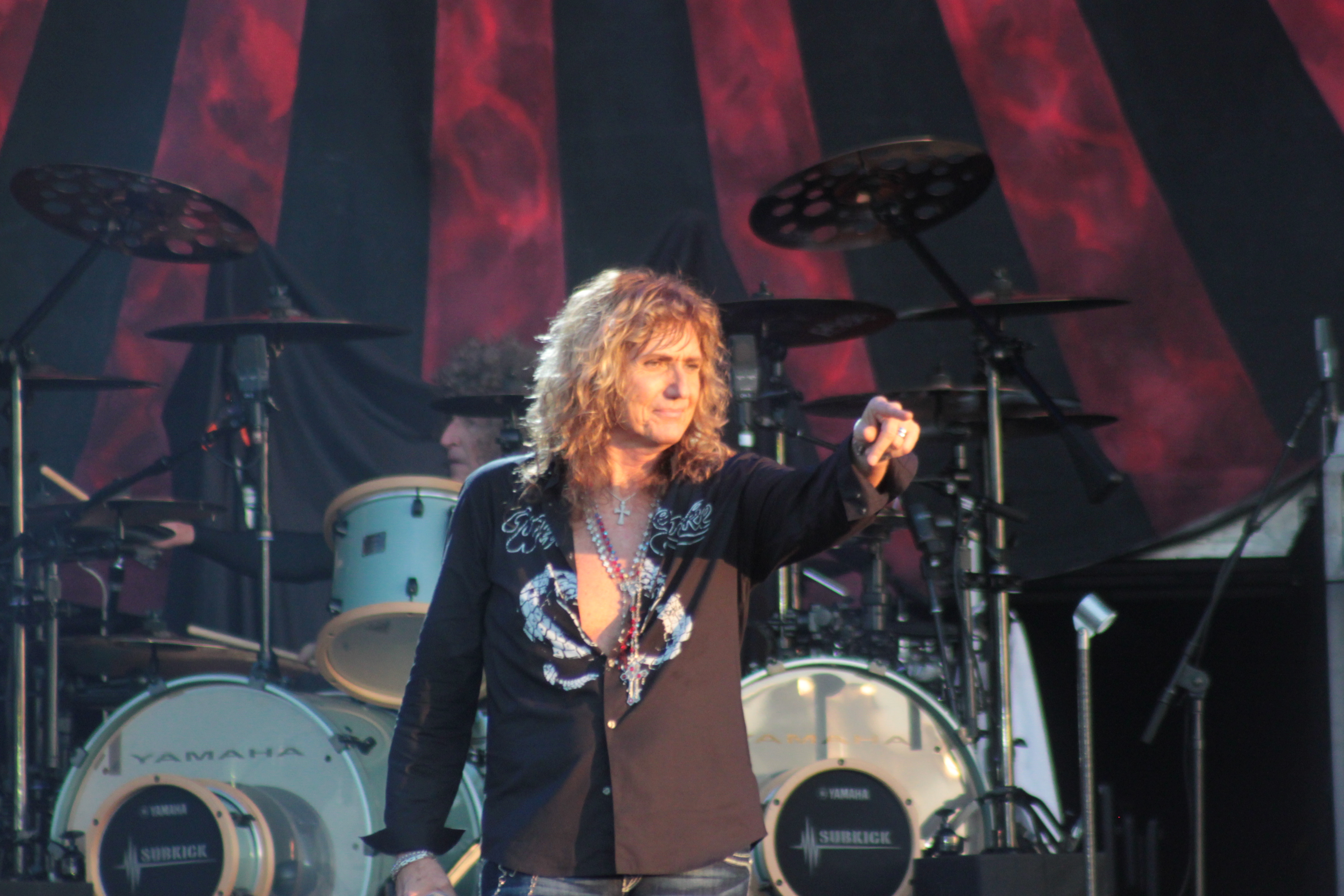 David Coverdale, Whitesnake, Hellfest 2013, Fr-44-Clisson.